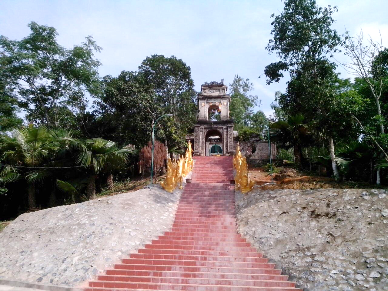 Cổng Chùa Ngọa Cương